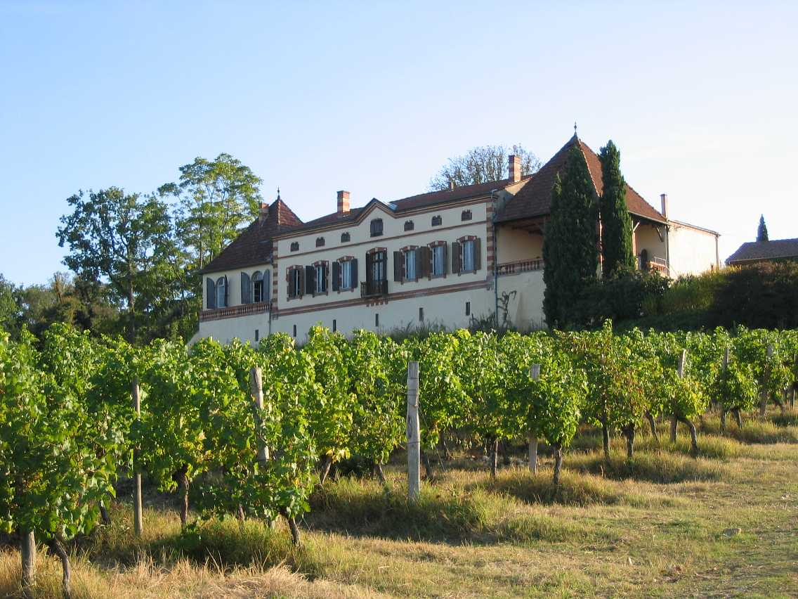 Vue générale du Château Labastidié